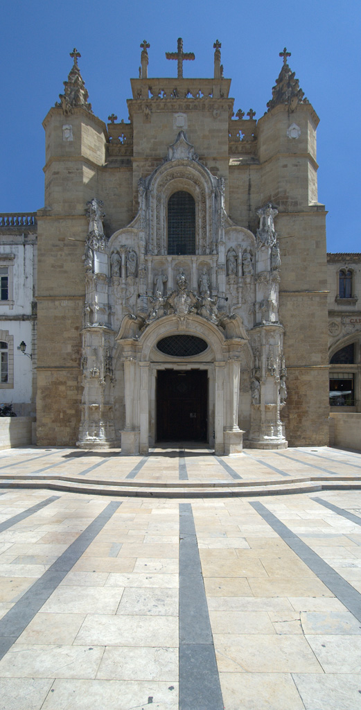 Façade of Santa Cruz Monastery in Coimbra, Portugal